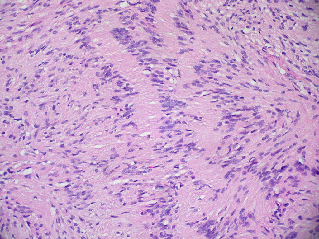 Plexiform Schwannoma